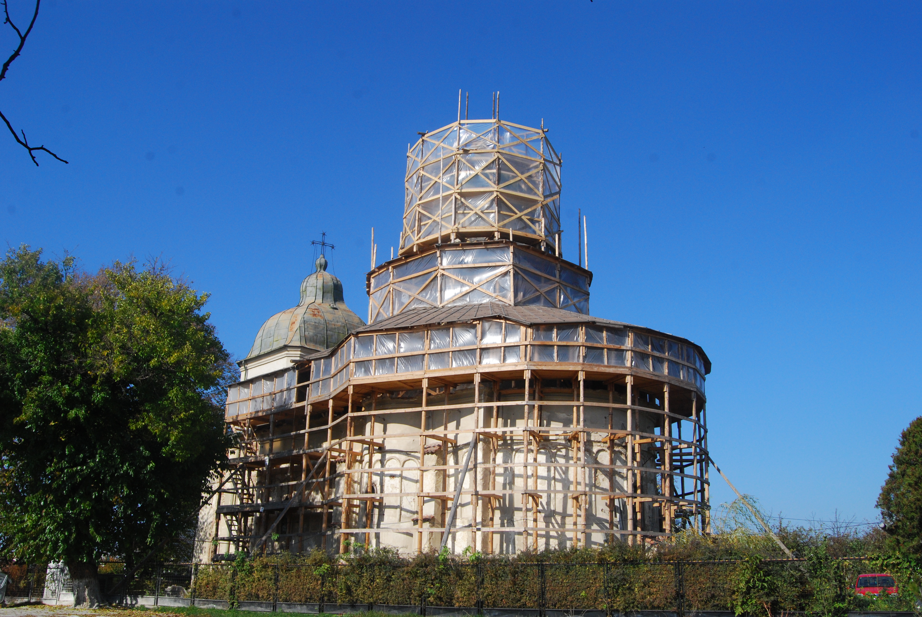 Biserica "Sf. Ioan cel Nou" -Nicorița